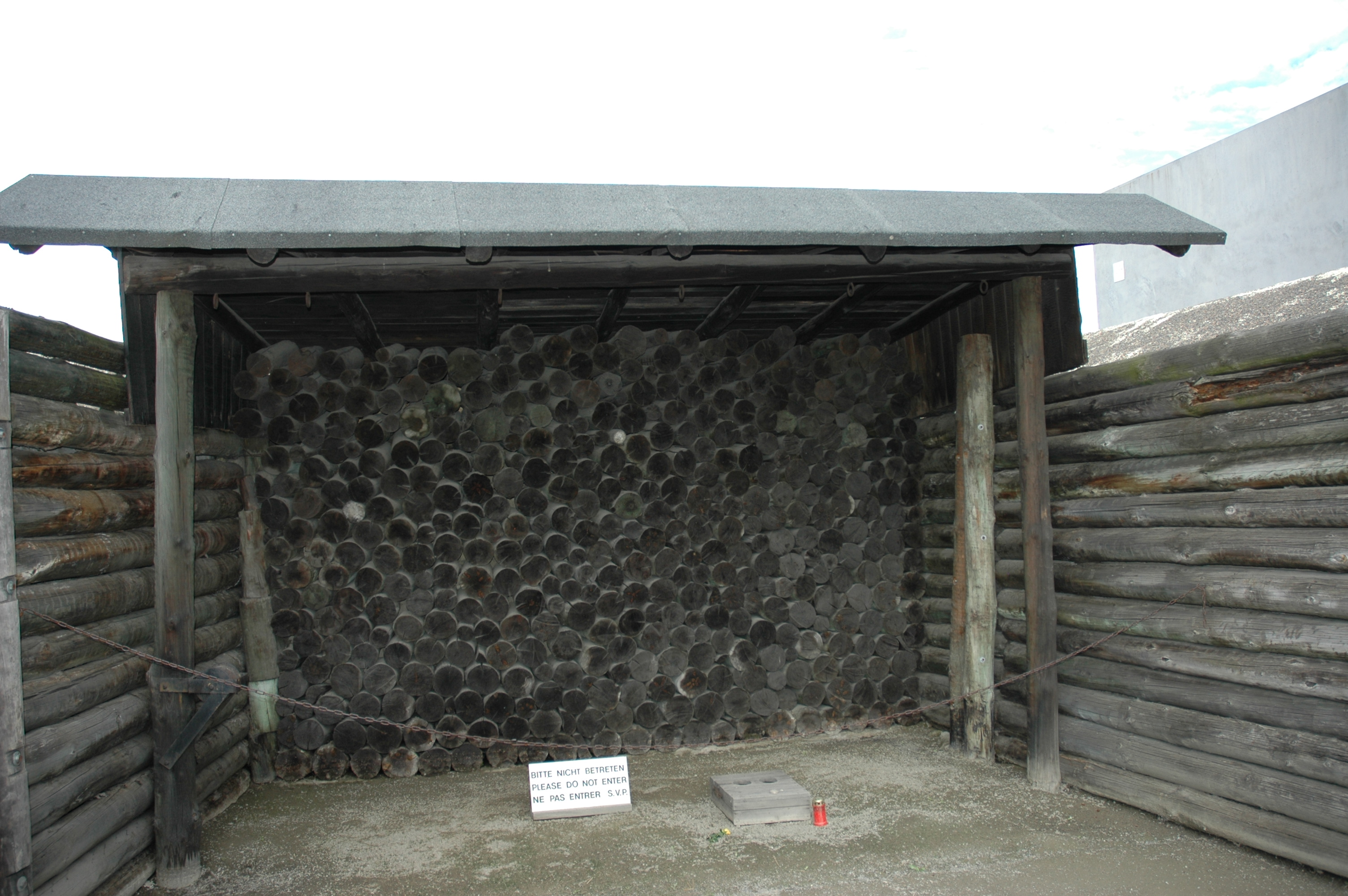 Station Z, the execution place in Sachsenhausen concentration camp Stason Z, henrettelsesstedet i Sachsenhausen konsentrasjonsleir